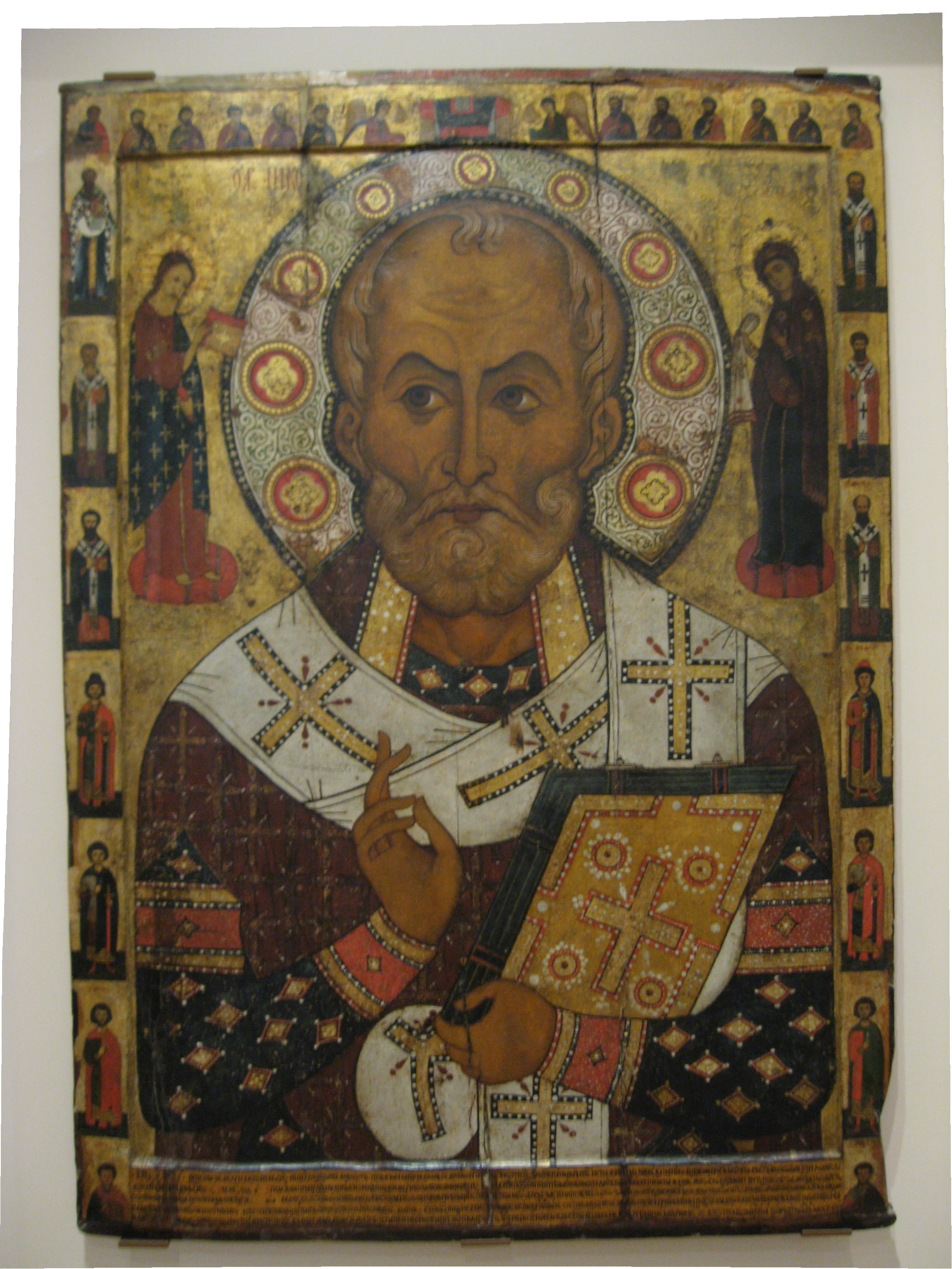 Икона Св. Николай из храма Николы на Липне. Новгородский музей. 1294 год. Алекса Петров.